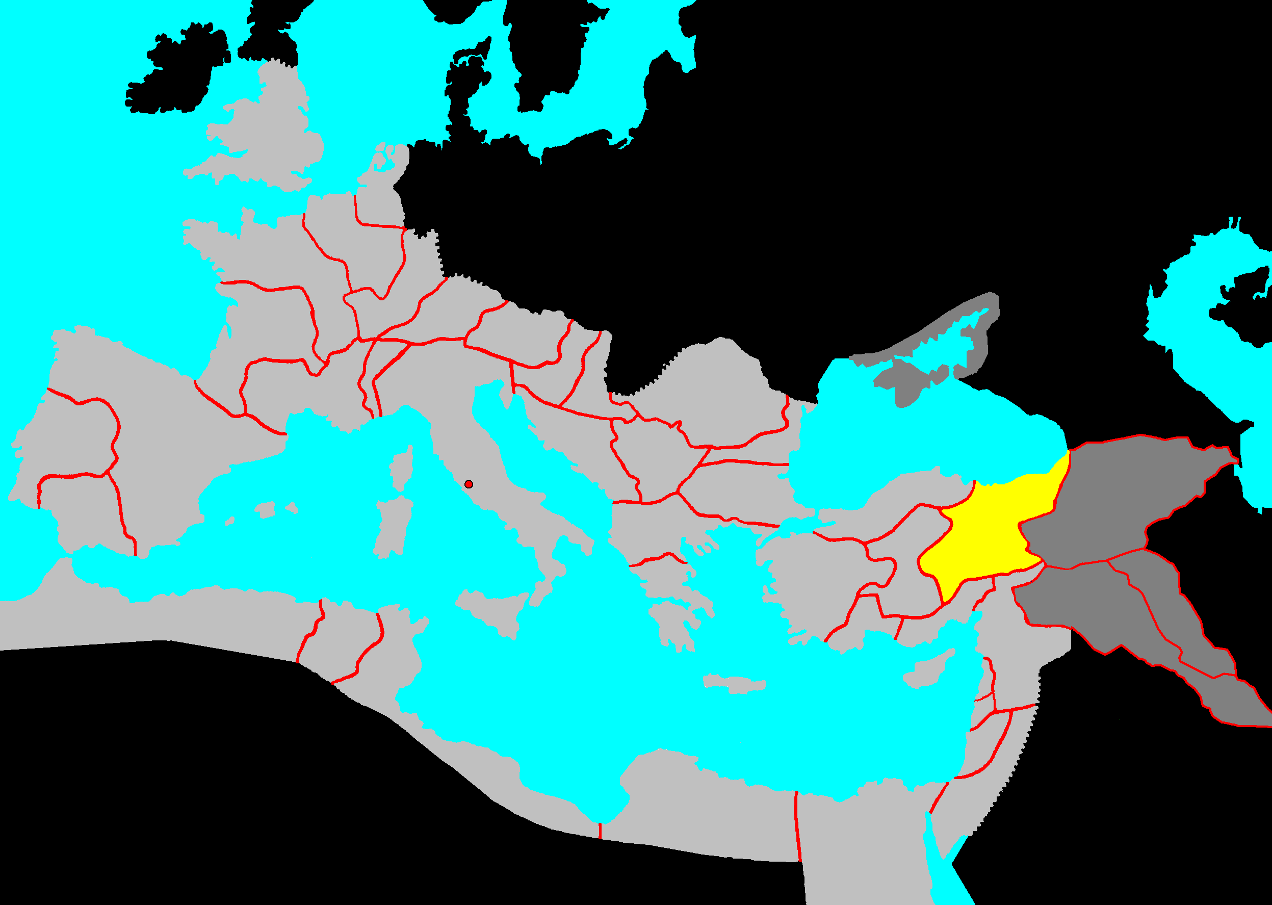 La provincia romana de Capadocia Description: provinces of the Roman Empire (Imperium Romanum) Source: own work Date: December 2005 Author: --Immanuel Giel 12:46, 13 December 2005 (UTC) Other versions: none